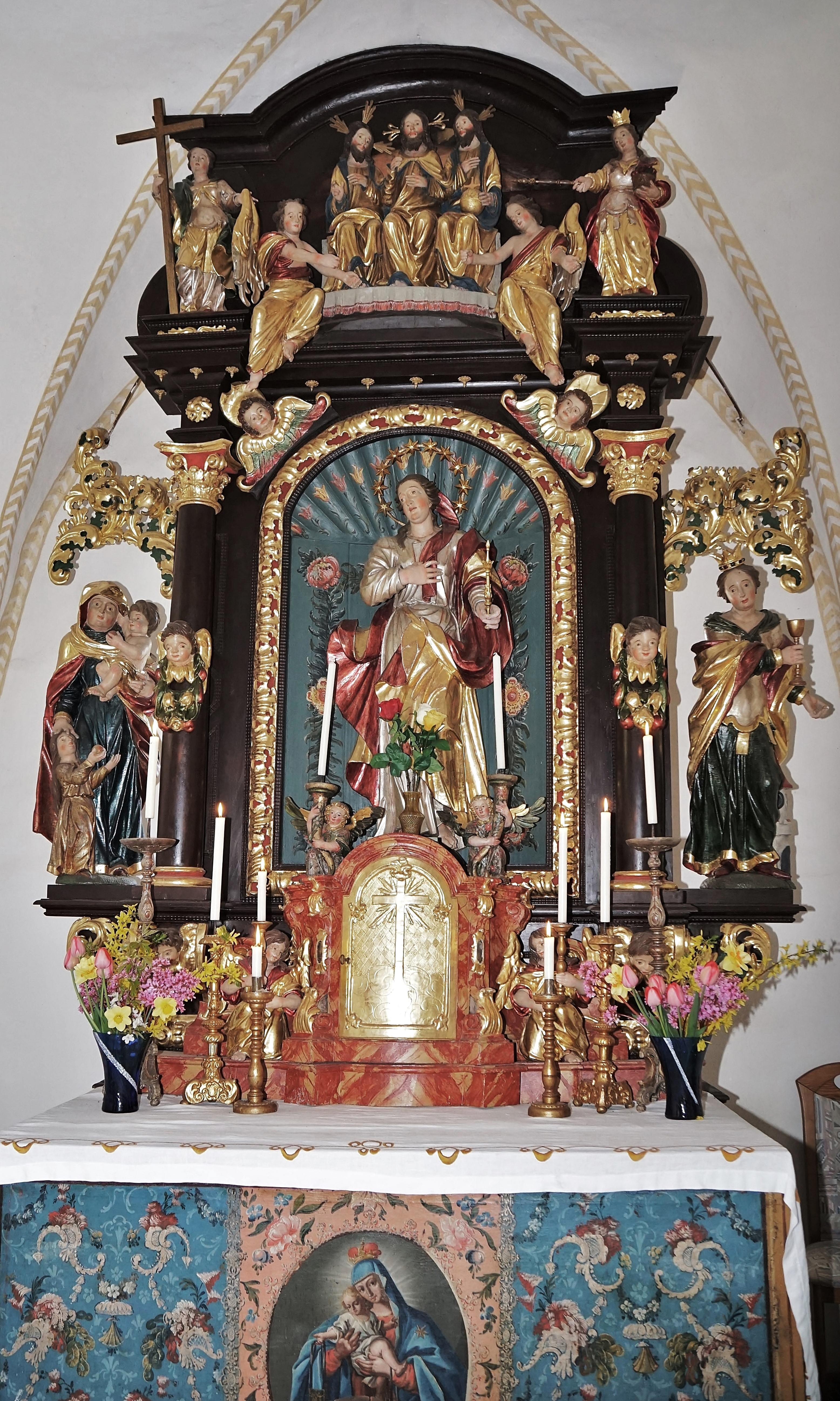 Hochaltar der Filialkirche Werschling (Himmelberg)